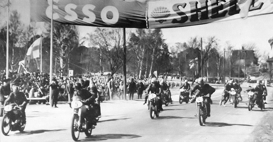 Eläintarhan ajojen moottoripyörien lähtötilanne 30-luvulla